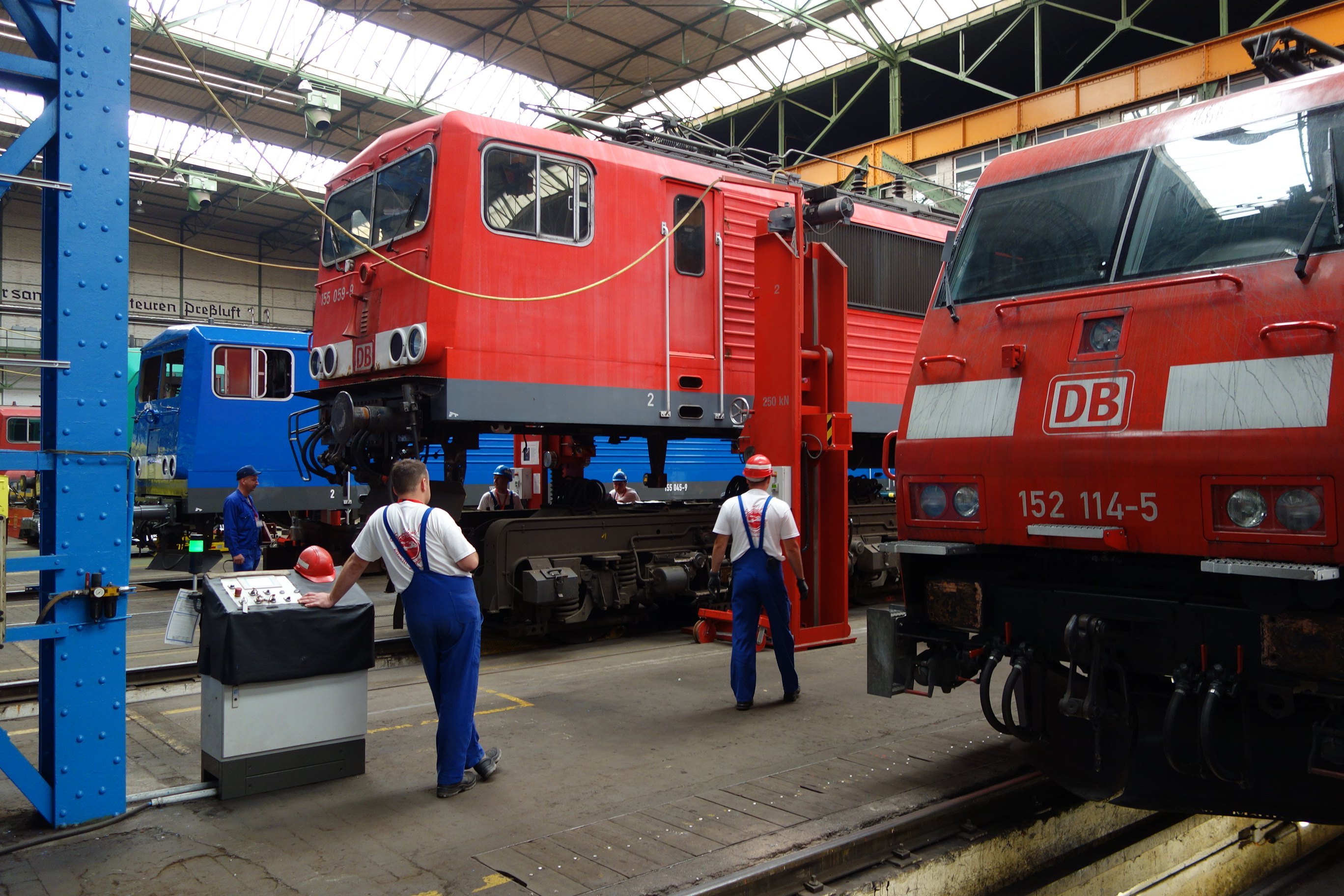 DB Fahrzeuginstandhaltung Werk Dessau, Tag der offenen Tür, Werkshalle mit Hebevorrichtung beim Anheben eines Lokkastens